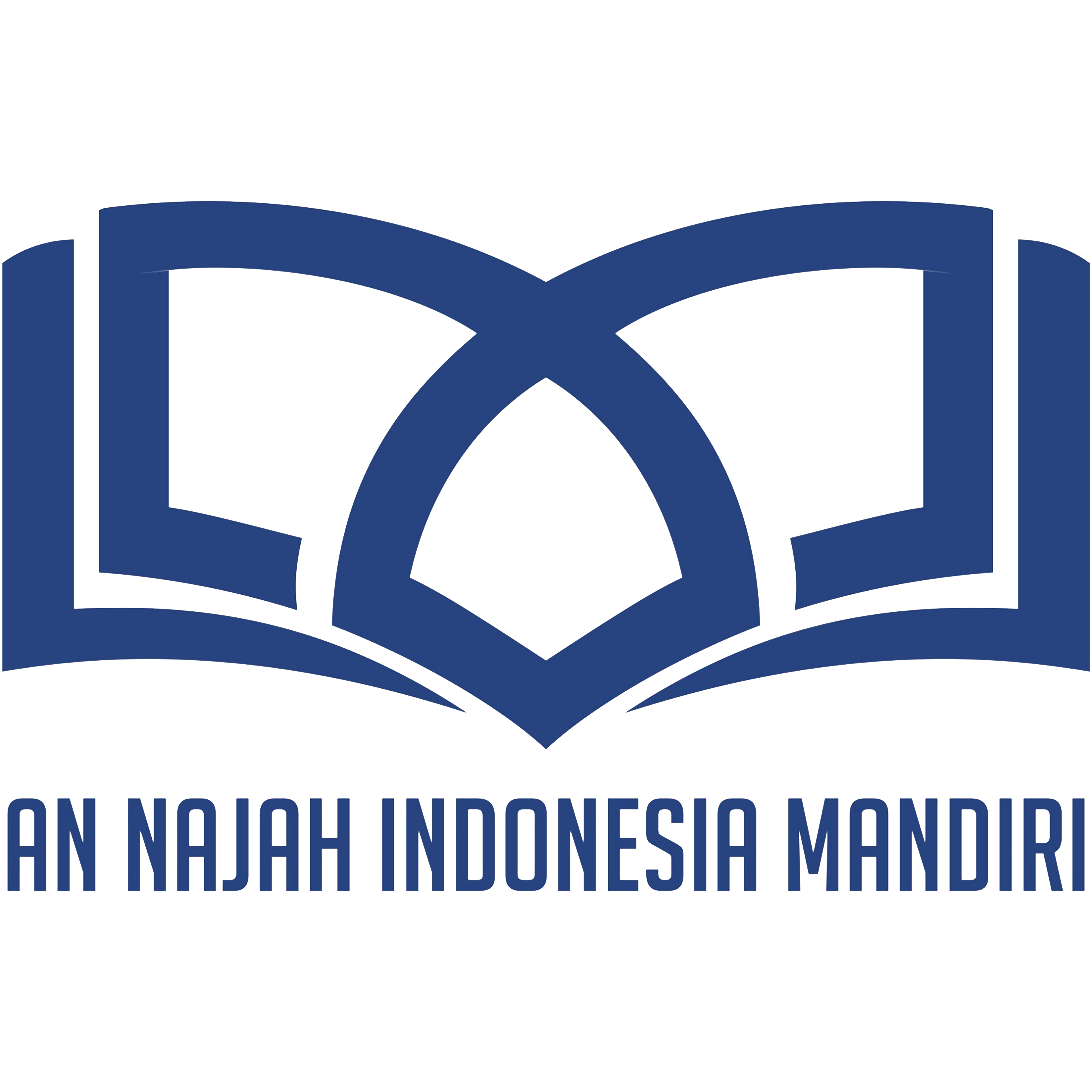 Logo stainim